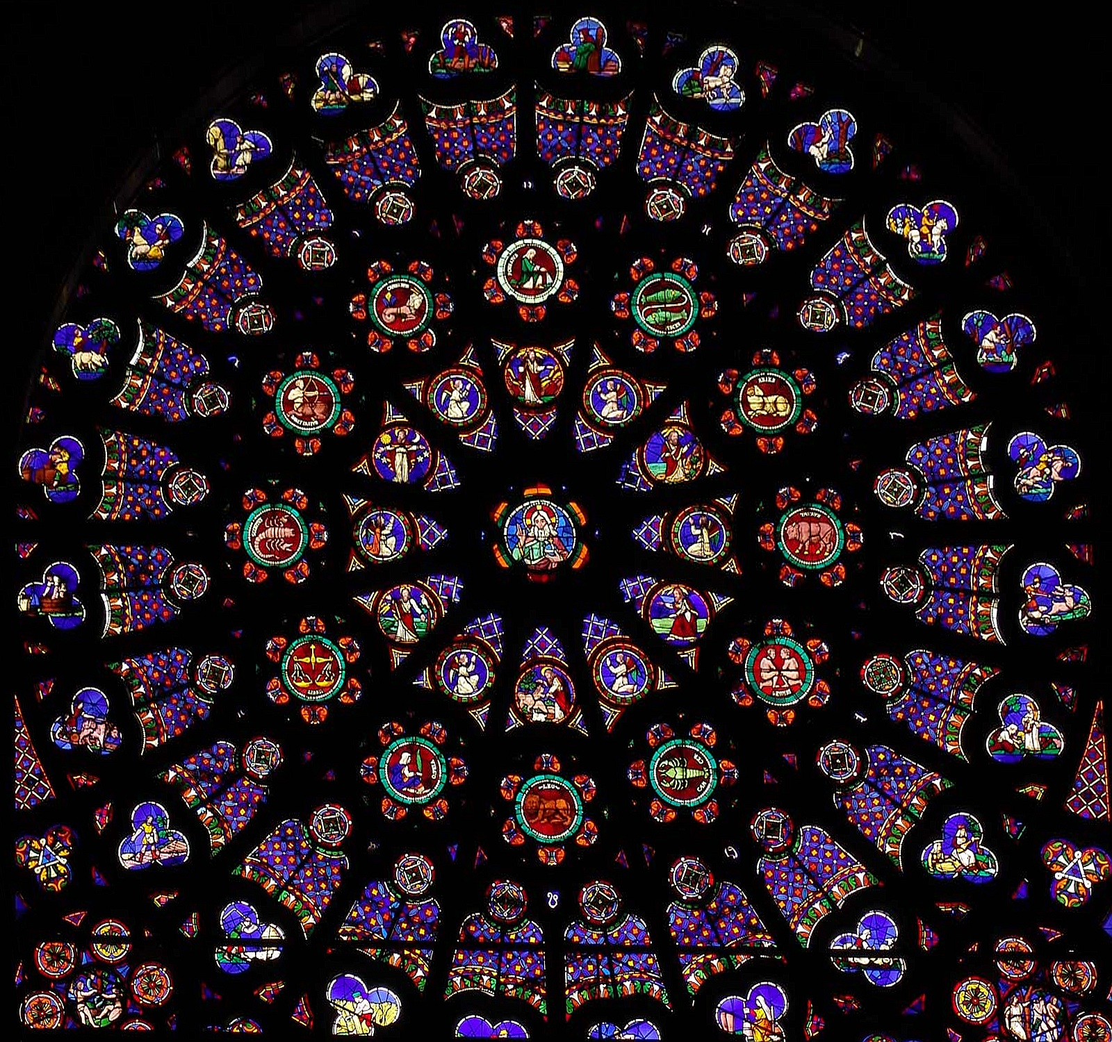 cf. source; digital stark verändert und bearbeitet (elektronische Perspektivenänderung)